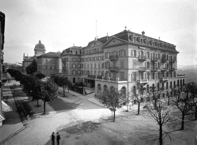 Das Hotel Bernerhof in Bern, im Hintergrund links ist das Bundeshaus zu sehen.